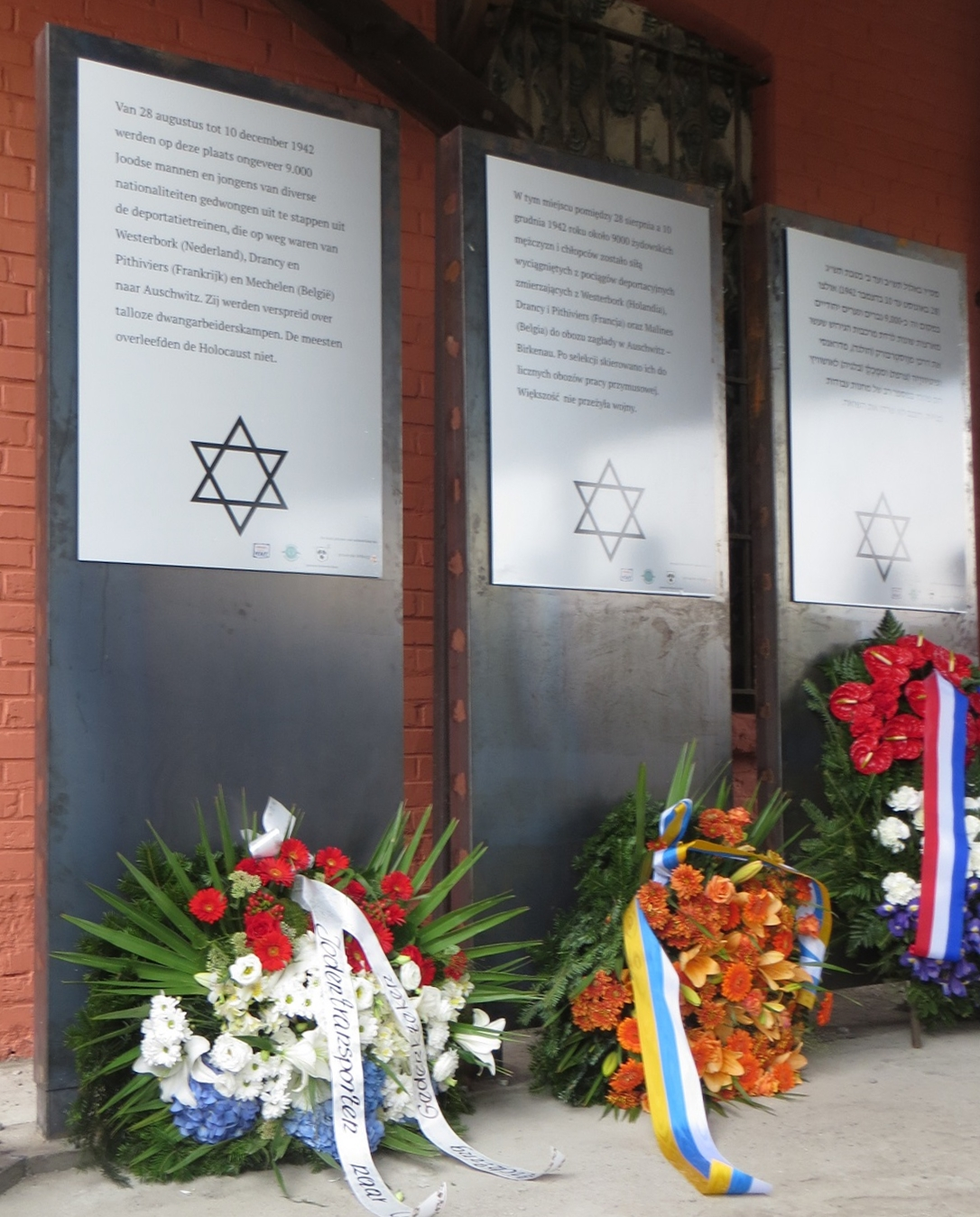 Odsłonięcie tablic na stacji w Koźlu (wrzesień 2016). Tablice upamiętniają transporty Żydów zachodnioeuropejskich do obozu w Oświęcimiu (jesień 1942 r.), w tym osoby które w wyniku selekcji w Koźlu trafiły do obozów pracy Organizacji Schmelt.